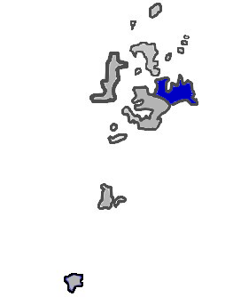 台灣省澎湖縣湖西鄉 KaurJmeb於2005年2月8日為編輯澎湖縣zh:湖西鄉所繪